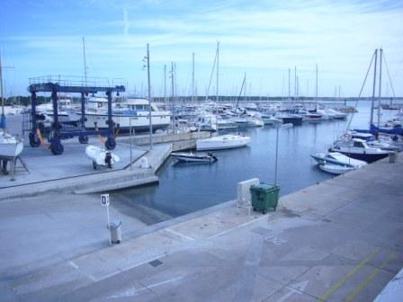 Vista general del puerto de La Rápita, municipio de Campos (Baleares, España)